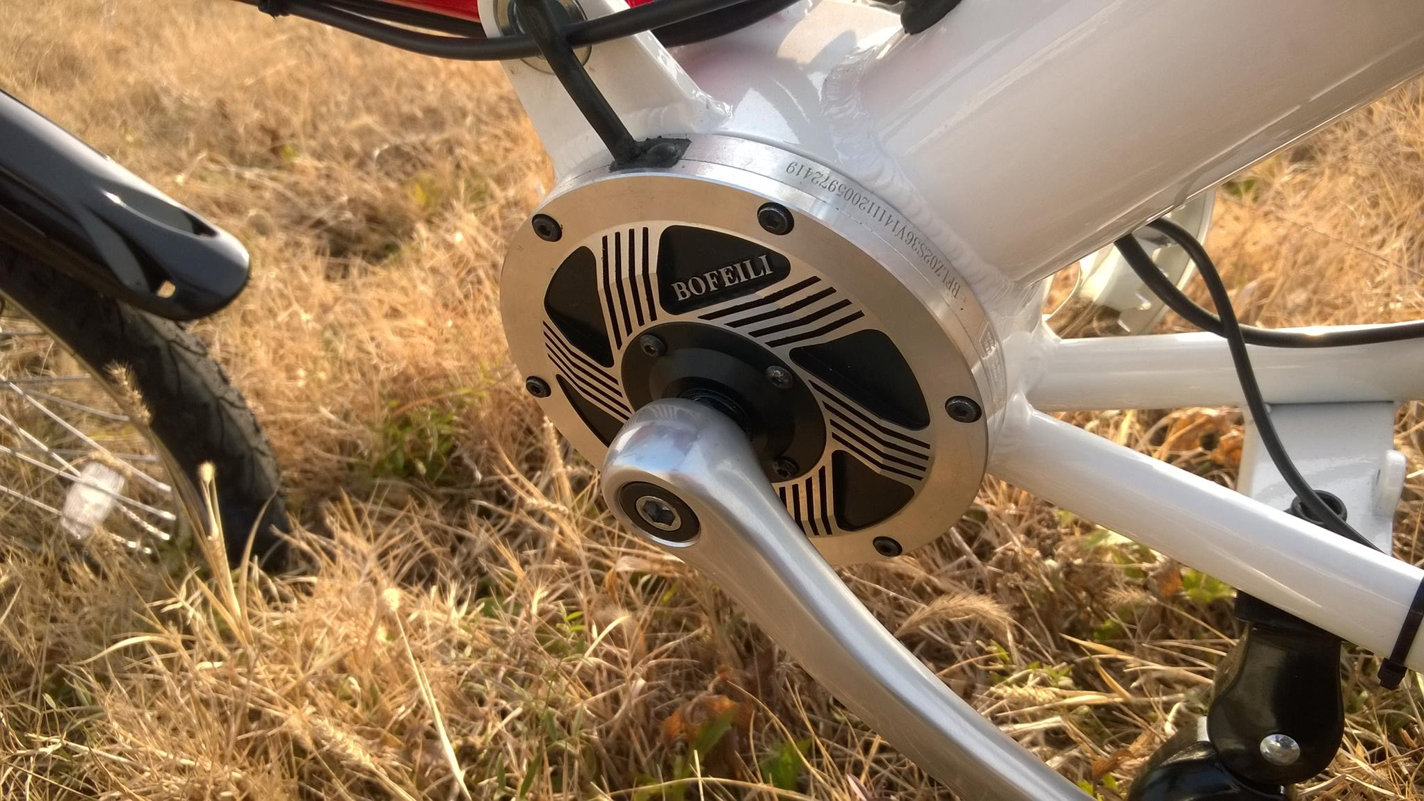 טכנולוגיה פורצת דרך של מנוע מרכזי אופניים חשמליים